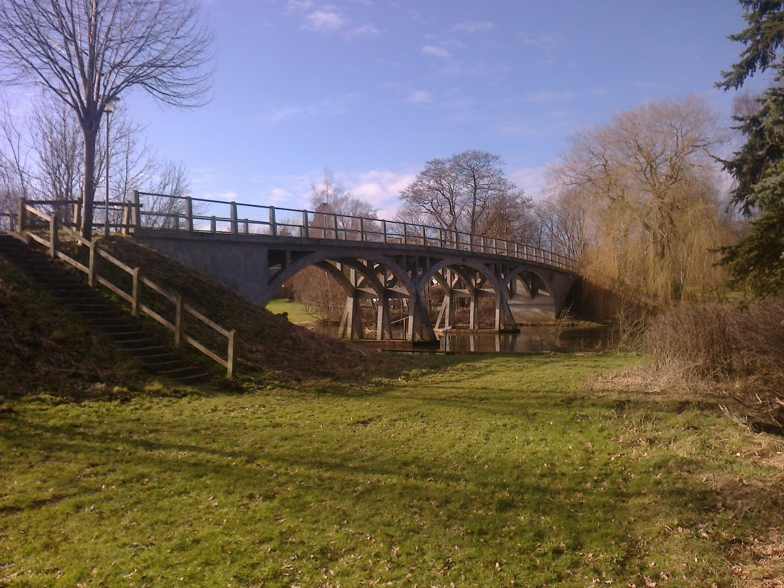 Amtmand Hoppes bro over Gudenåen ved Langå - Danmarks første vejbro af jernbeton